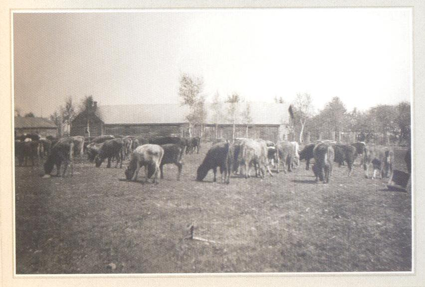 Беларуская (тарашкевіца): Холмеч (Chołmieč)